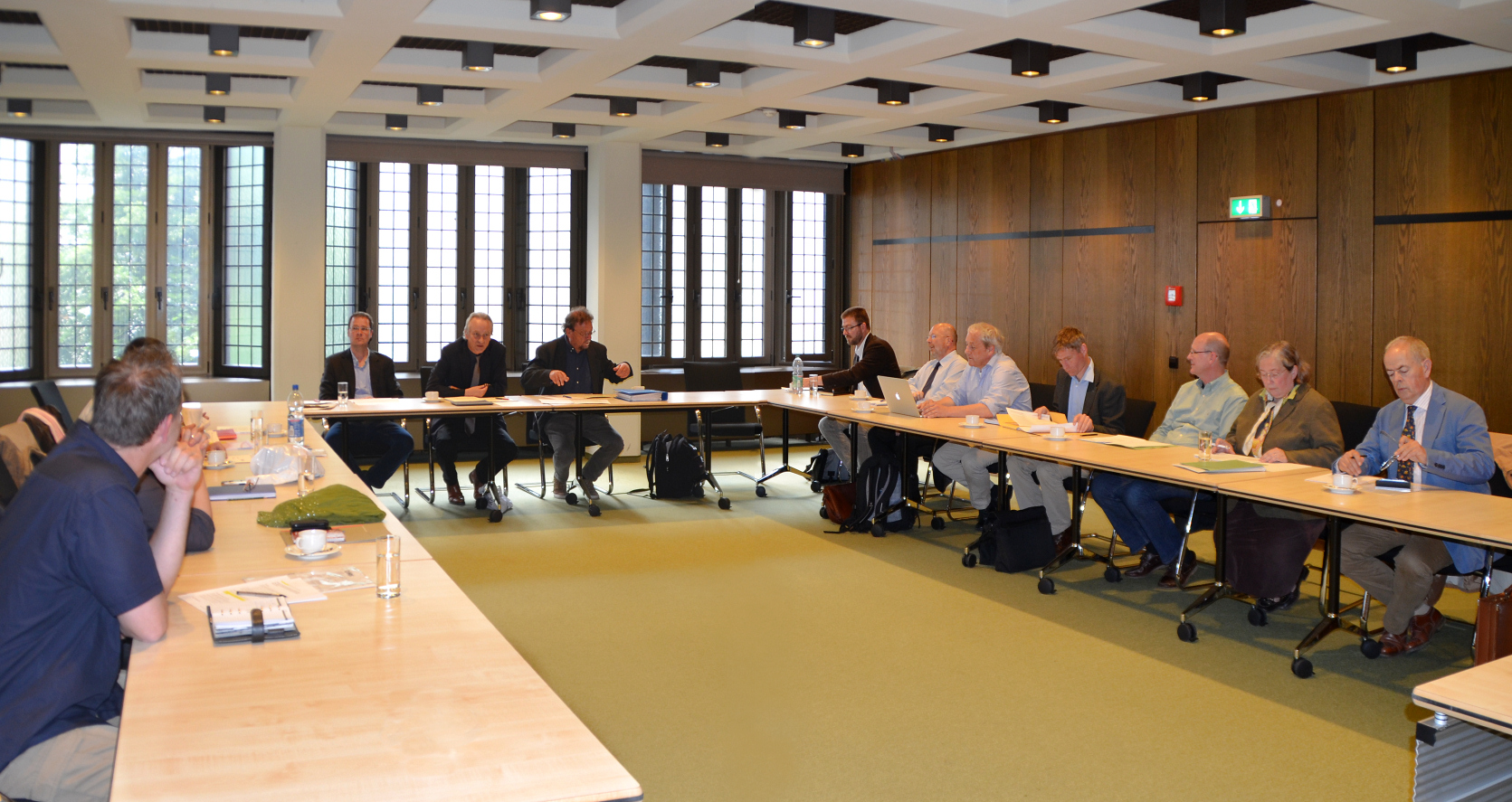 Tagung des Hauptausschusses der Archäologische Kommission Niedersachsen in Hannover